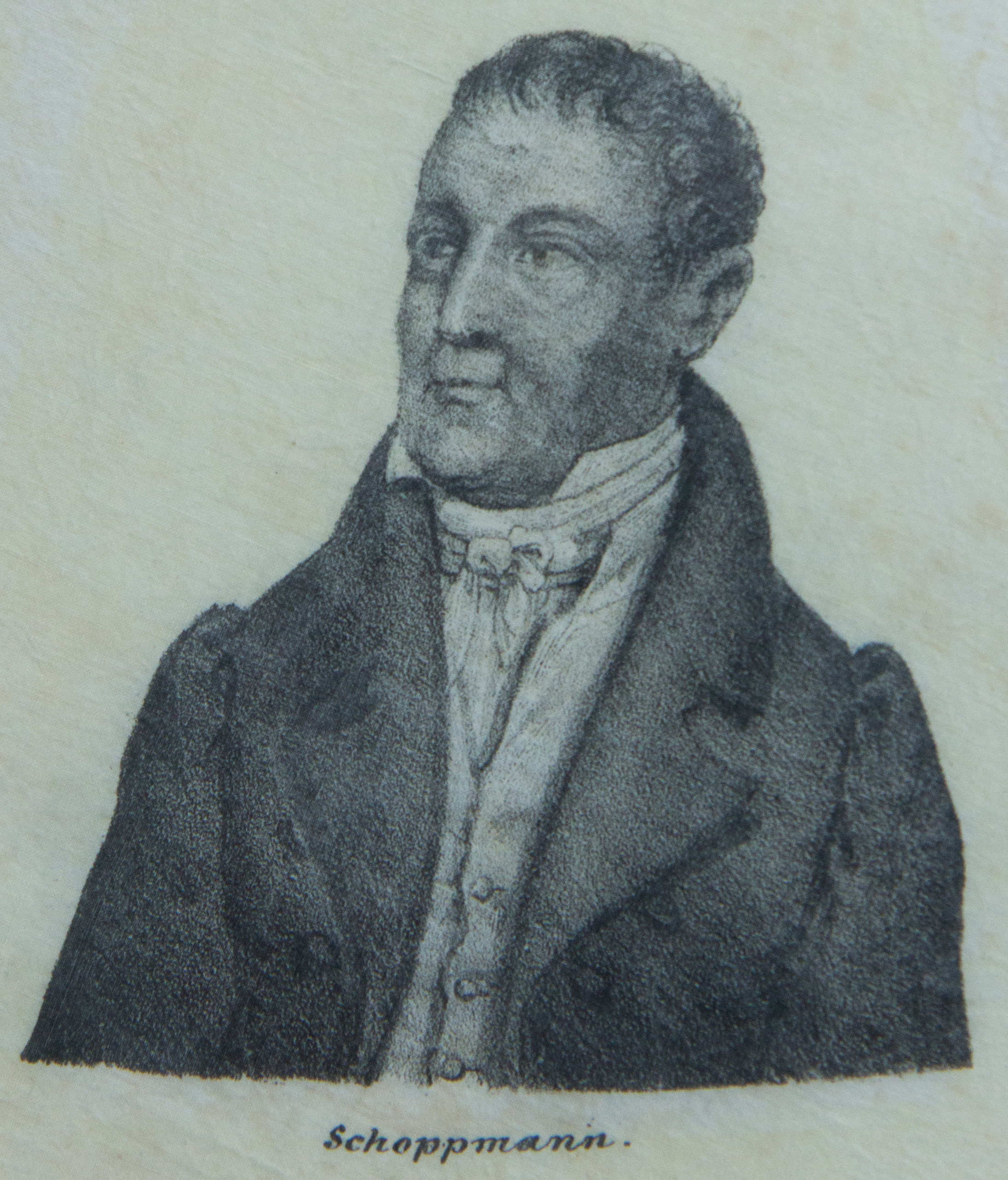 Hambacher Tuch, fotografiert im Archiv des Liberalismus in Gummersbach: Johann Jakob Schoppmann (1767-1840)